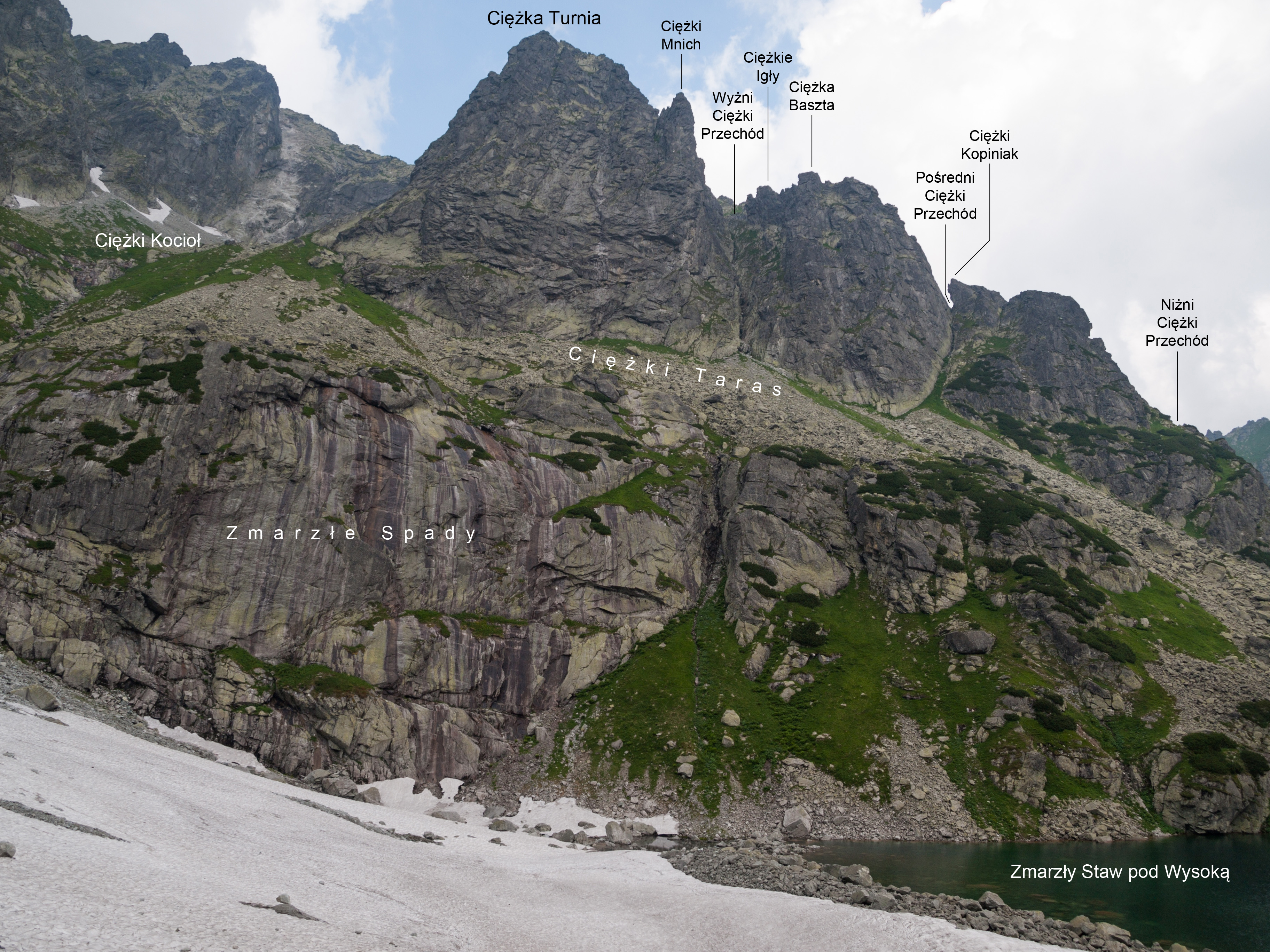 Południowa ściana i południowo-wschodnia grań Ciężkiej Turni (polskie podpisy).